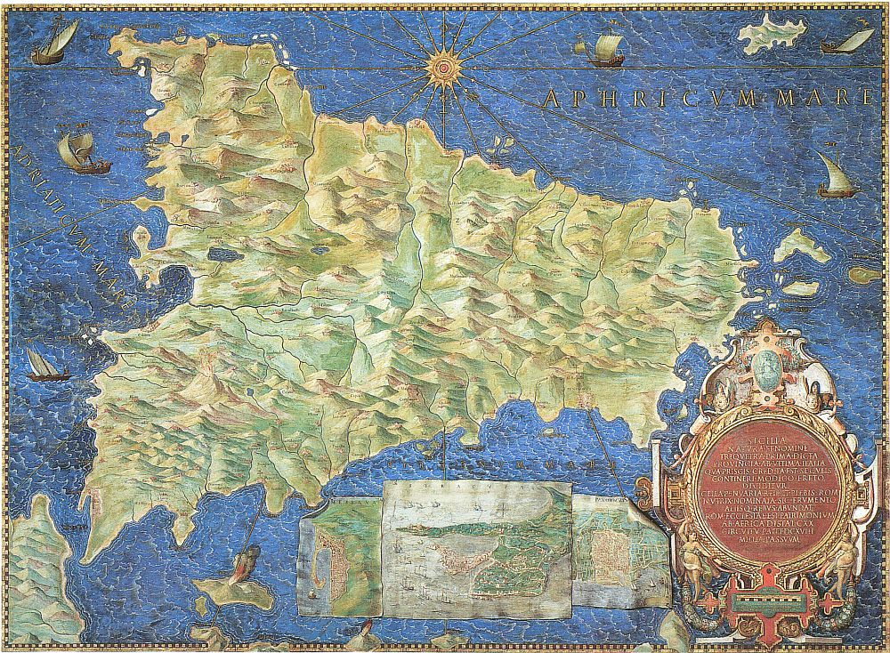 Sizilien, historische Karte (Hinweis: Die Himmelsrichtungen der Karte sind nicht in der modernen Darstellung, sondern Norden unten, Süden oben, Westen rechts und Osten links)